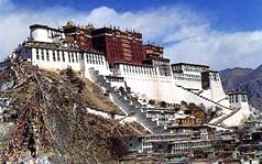 Potala Palace, Lhasa